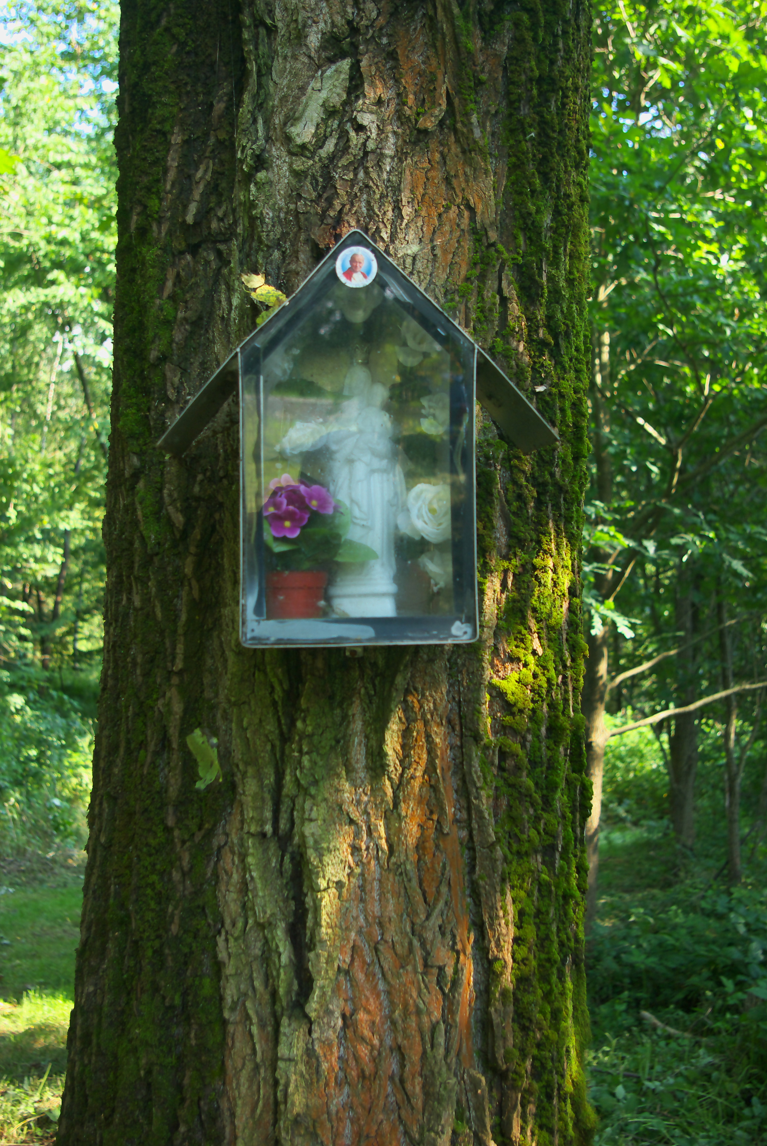 Miejsce pamięci w Hanusiskach pod Zagórzem, upamiętniające ofiary egzekucji dokonanej przez Niemców 27 lipca 1944. Zdjęcie z obchodów w dniu 27 lipca 2018.